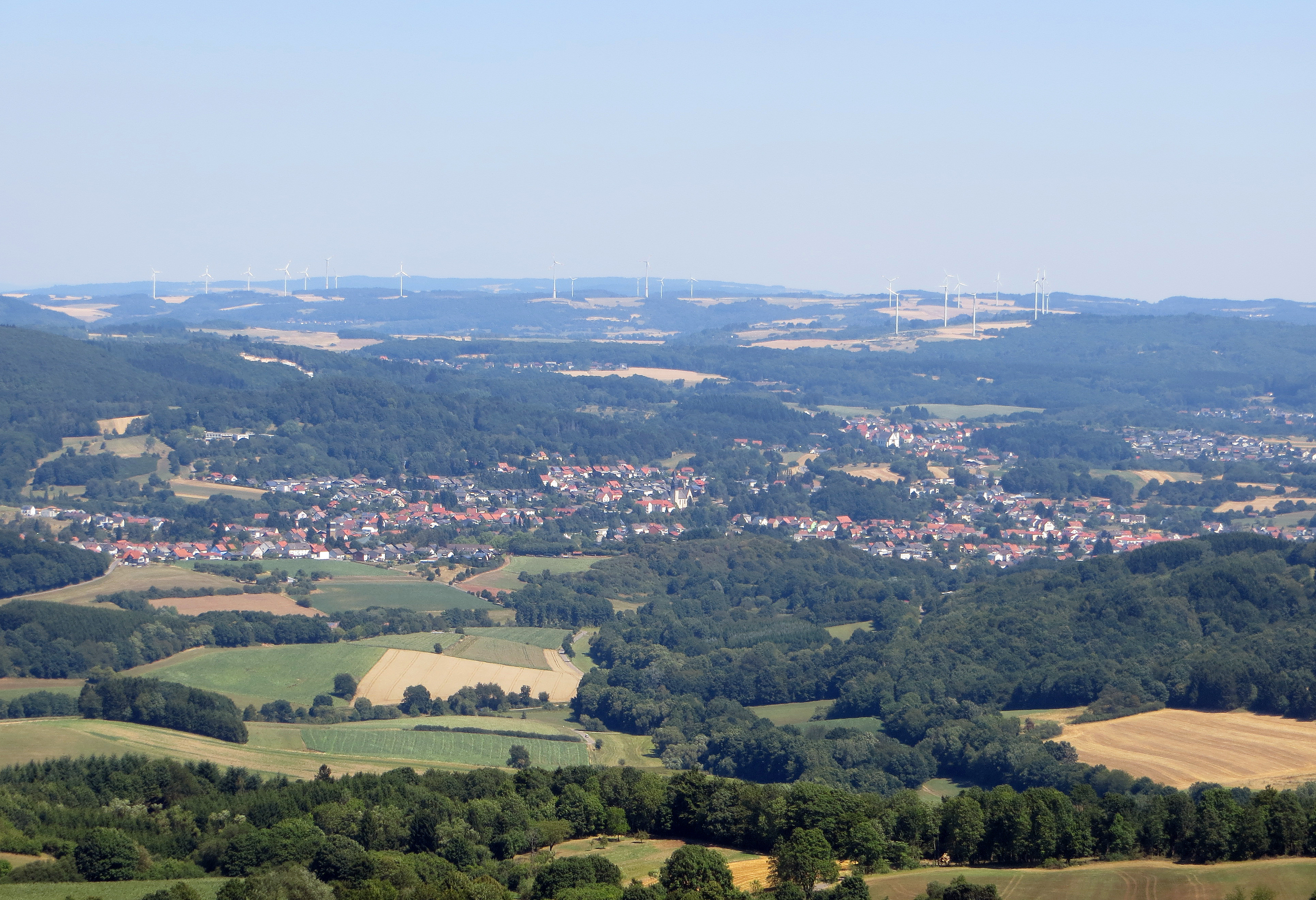 Oberthal, gelegen im saarländischen Landkreis St. Wendel, vom Schaumberg aus gesehen